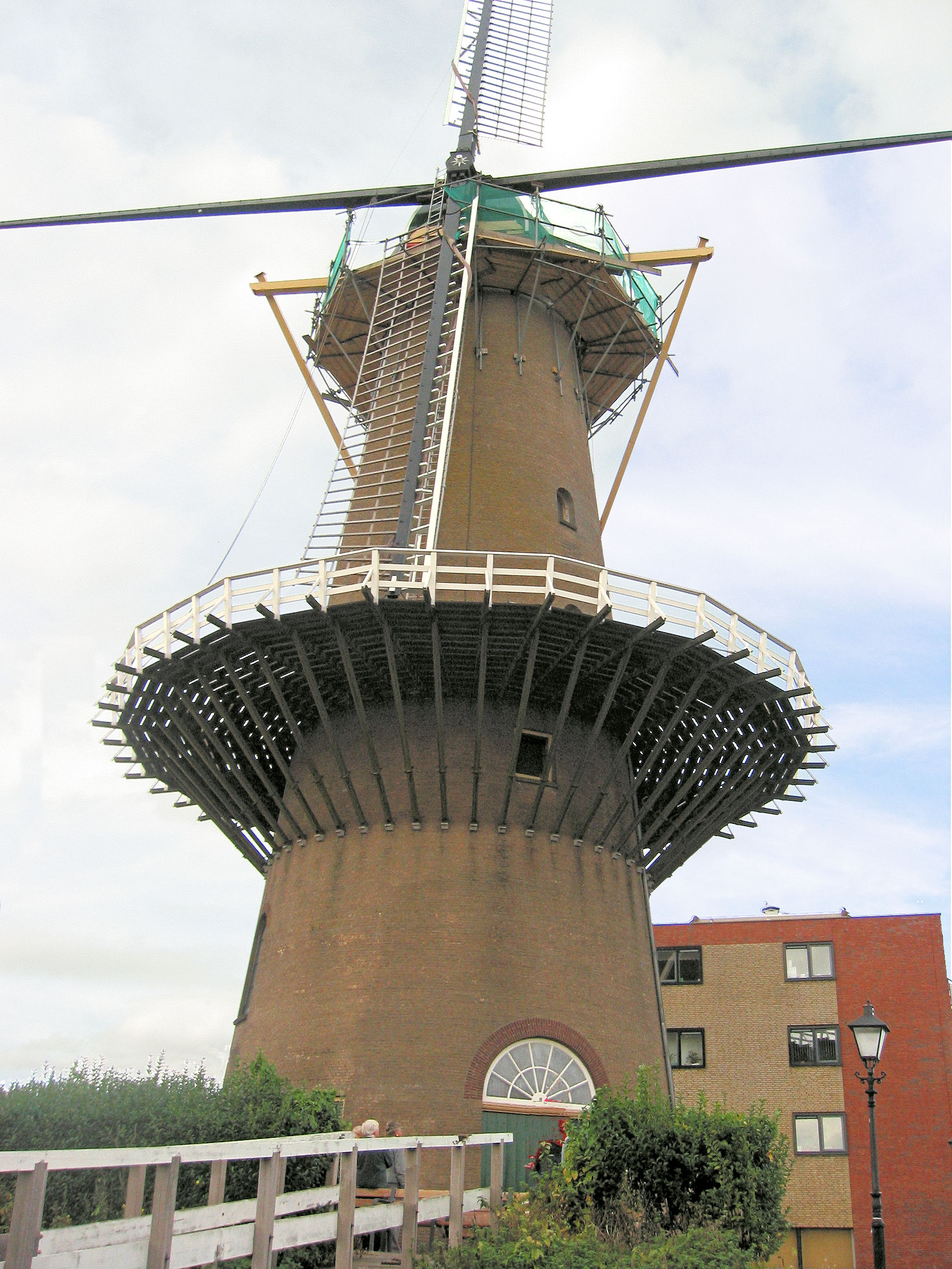 De Distilleerketel in Delfshaven, Zuid-Holland, the Netherlands